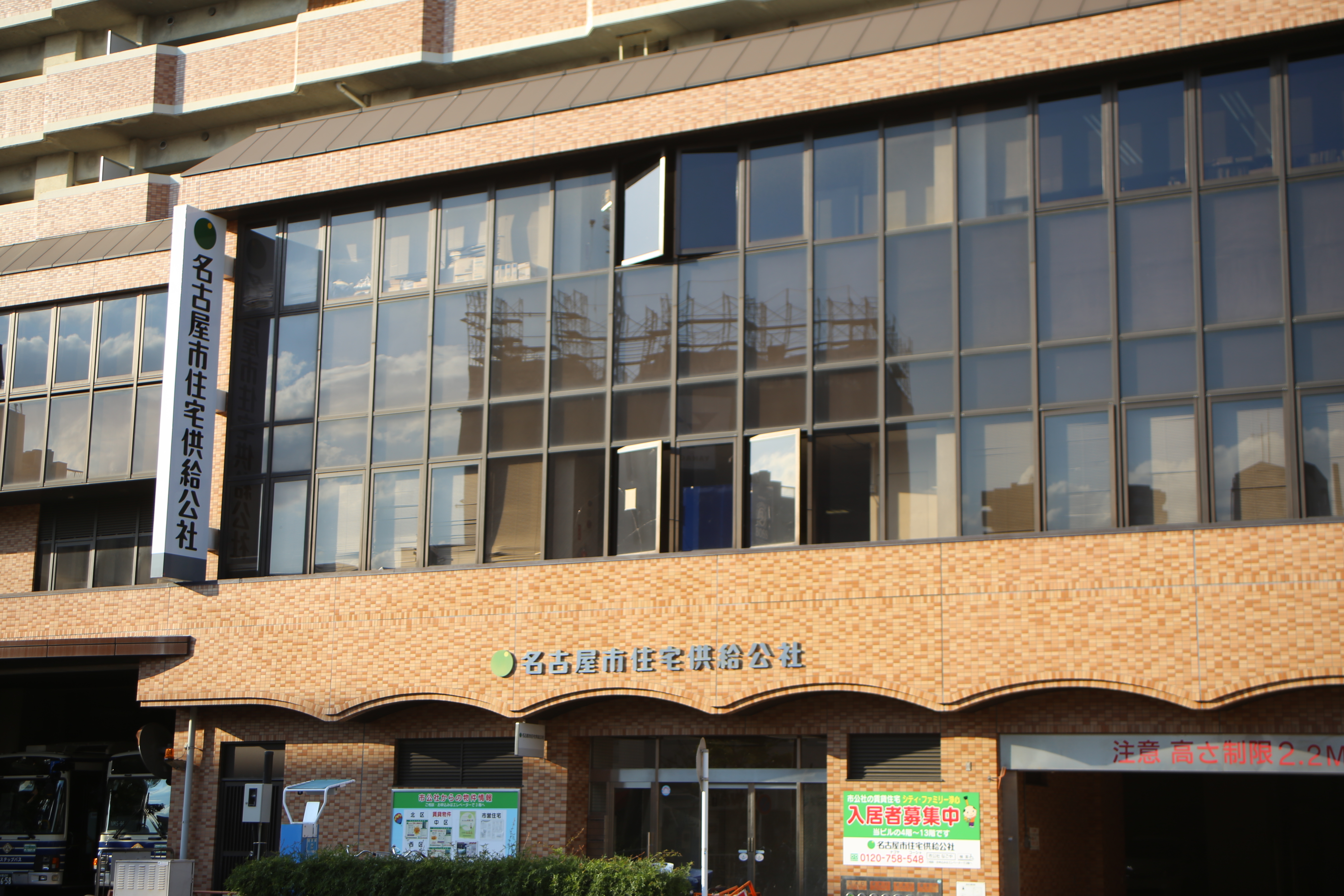 名古屋市西区浄心一丁目の名古屋市住宅供給公社